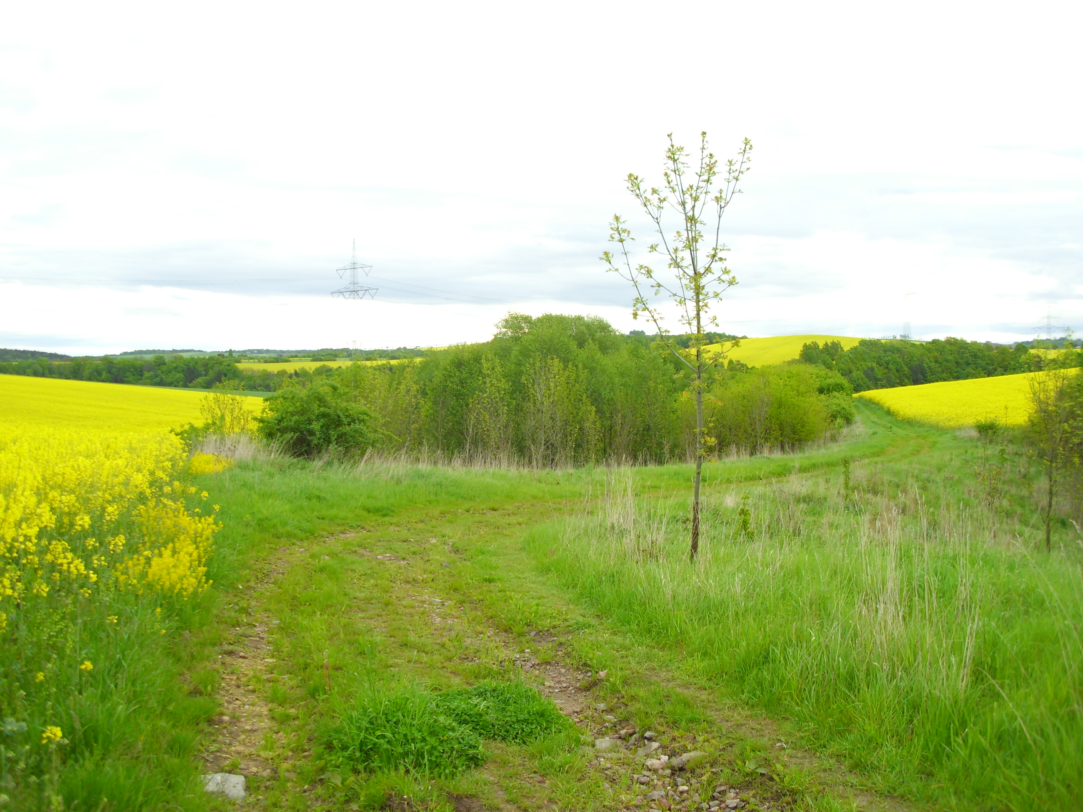 Die unterhalb liegende Waldung des Grundes liegt im Landschaftsschutzgebiet der obere verläuft weiter bis an den Aschenberg.